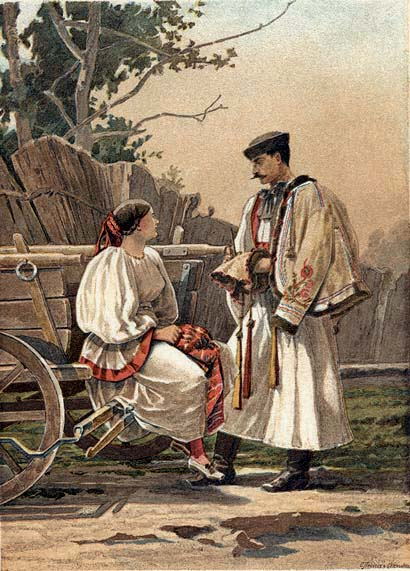 Ormánsági népviselet Baranyában. Feszty Árpád rajza